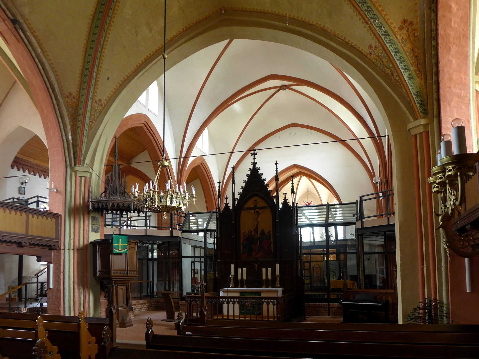 Innenansicht der St. Marien Kirche zu Boizenburg. Im Vordergrund Altar und Kanzel, im Hintergrund Gemeindesaal und Winterkirche.